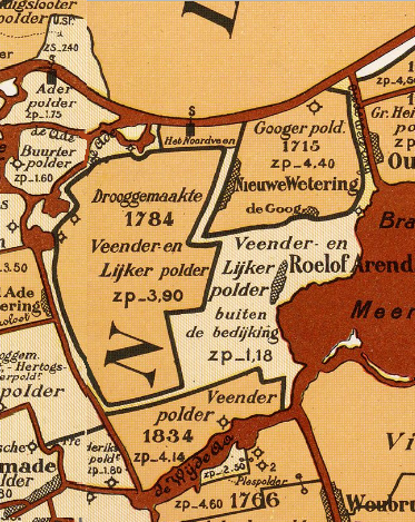 Veender en Lijkerpolder (en omgeving)